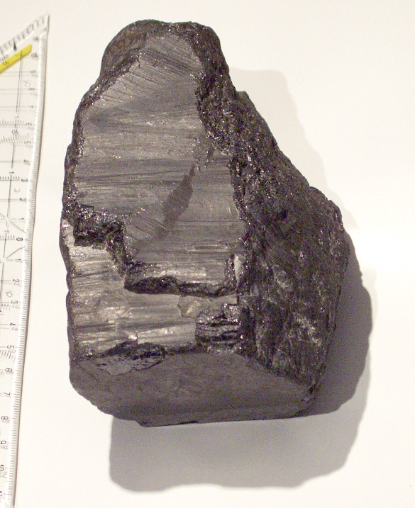 Columbit, Madagaskar, (Mn,Fe2+)(Nb,Ta)2O6